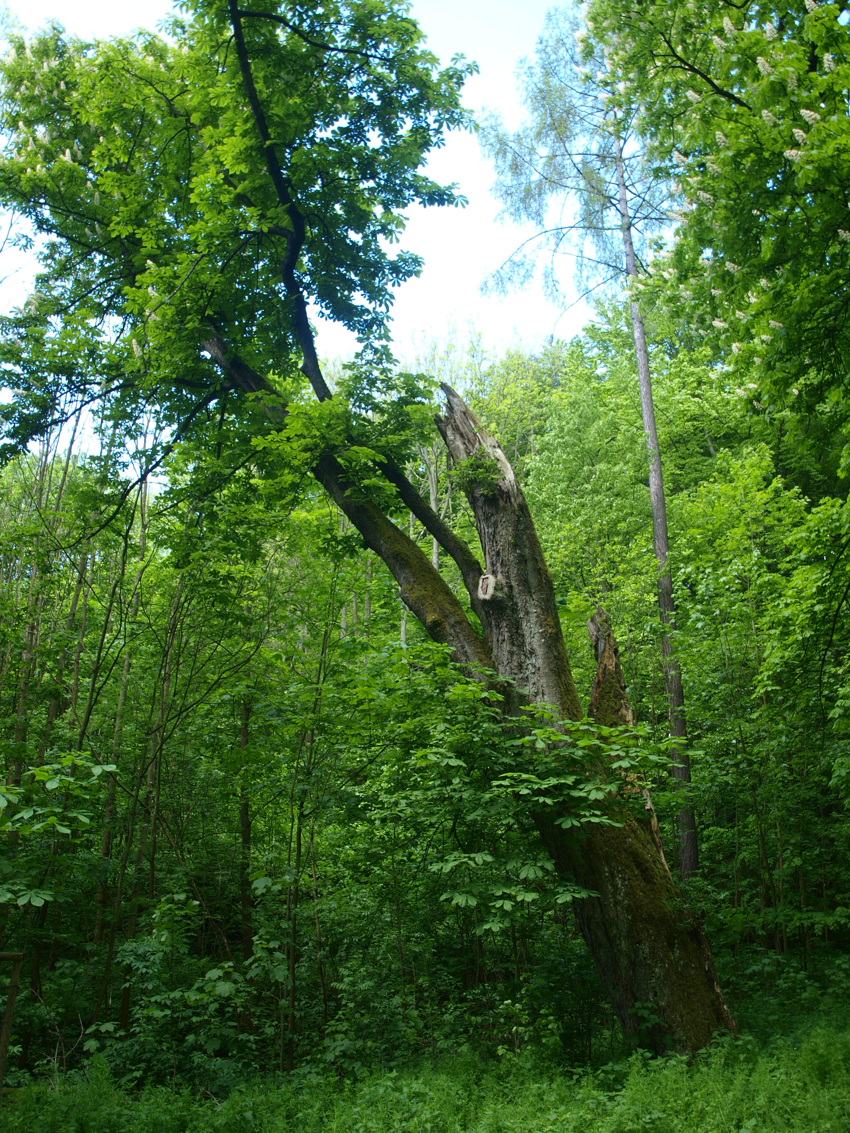 Přírodní památka Lysická obora